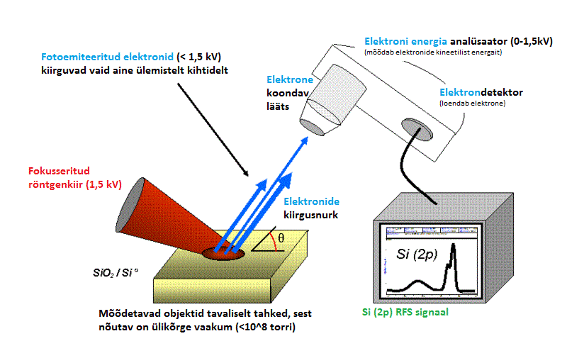 Monokromaatse RFS süsteemi põhikomponendid